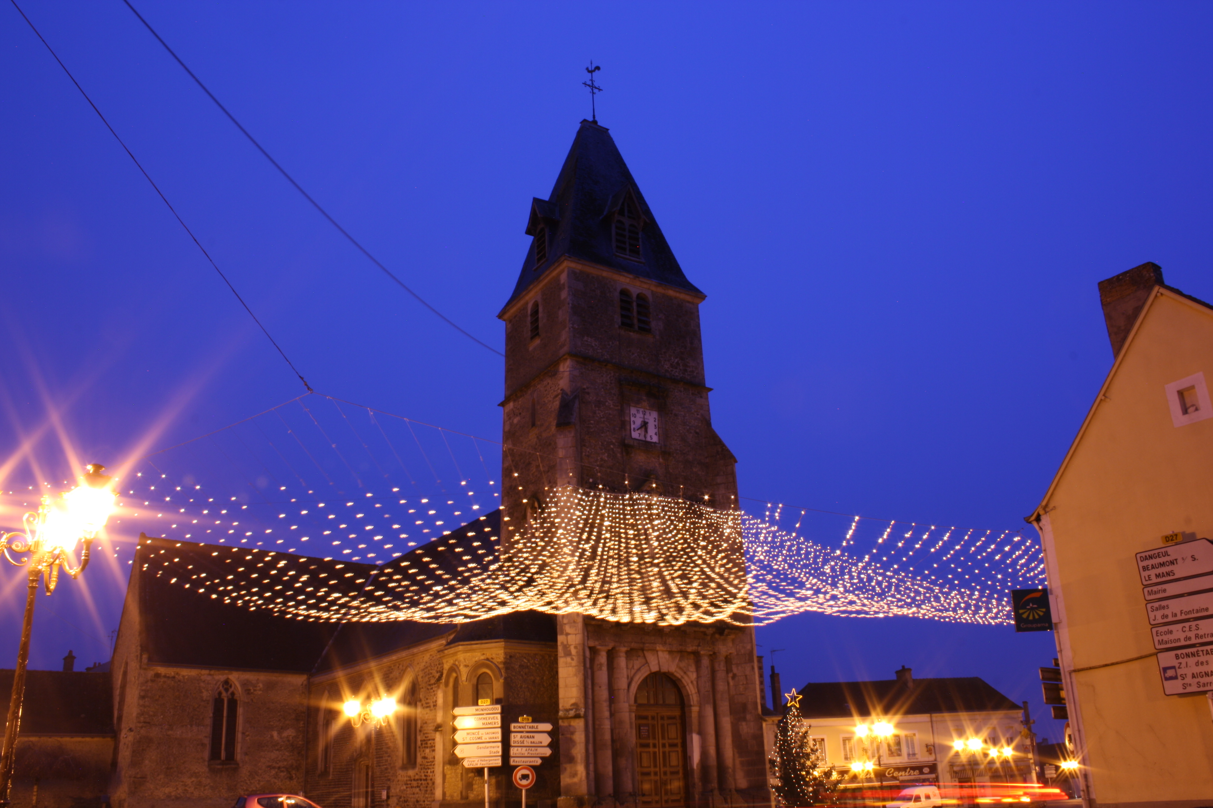 Eglise de Marolles les Braults